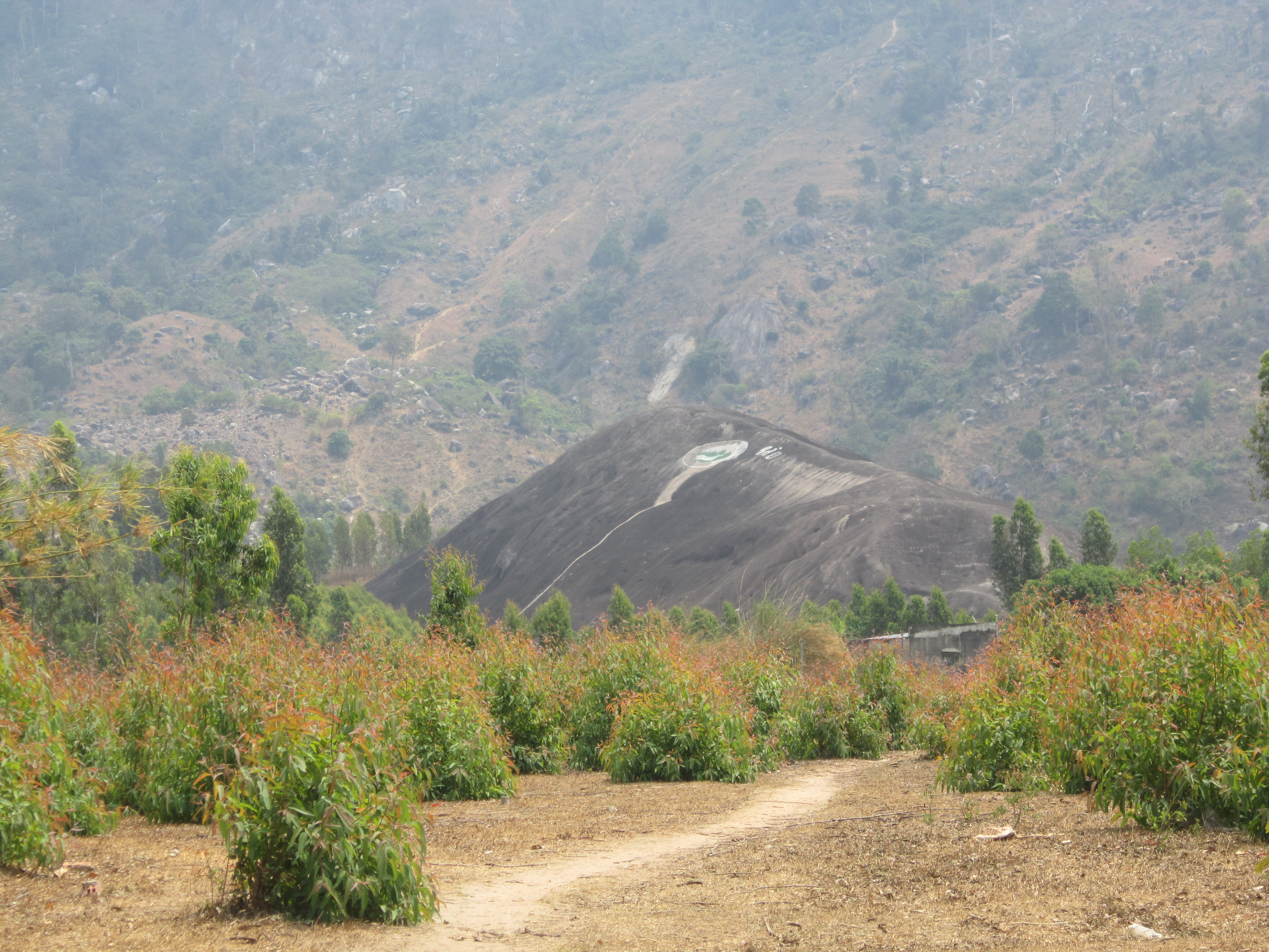 Đá Voi Yang-tao